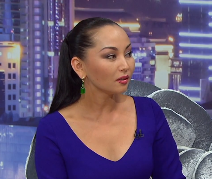 Баян Есентаева в студии программы «Sky студия» (Astana TV).